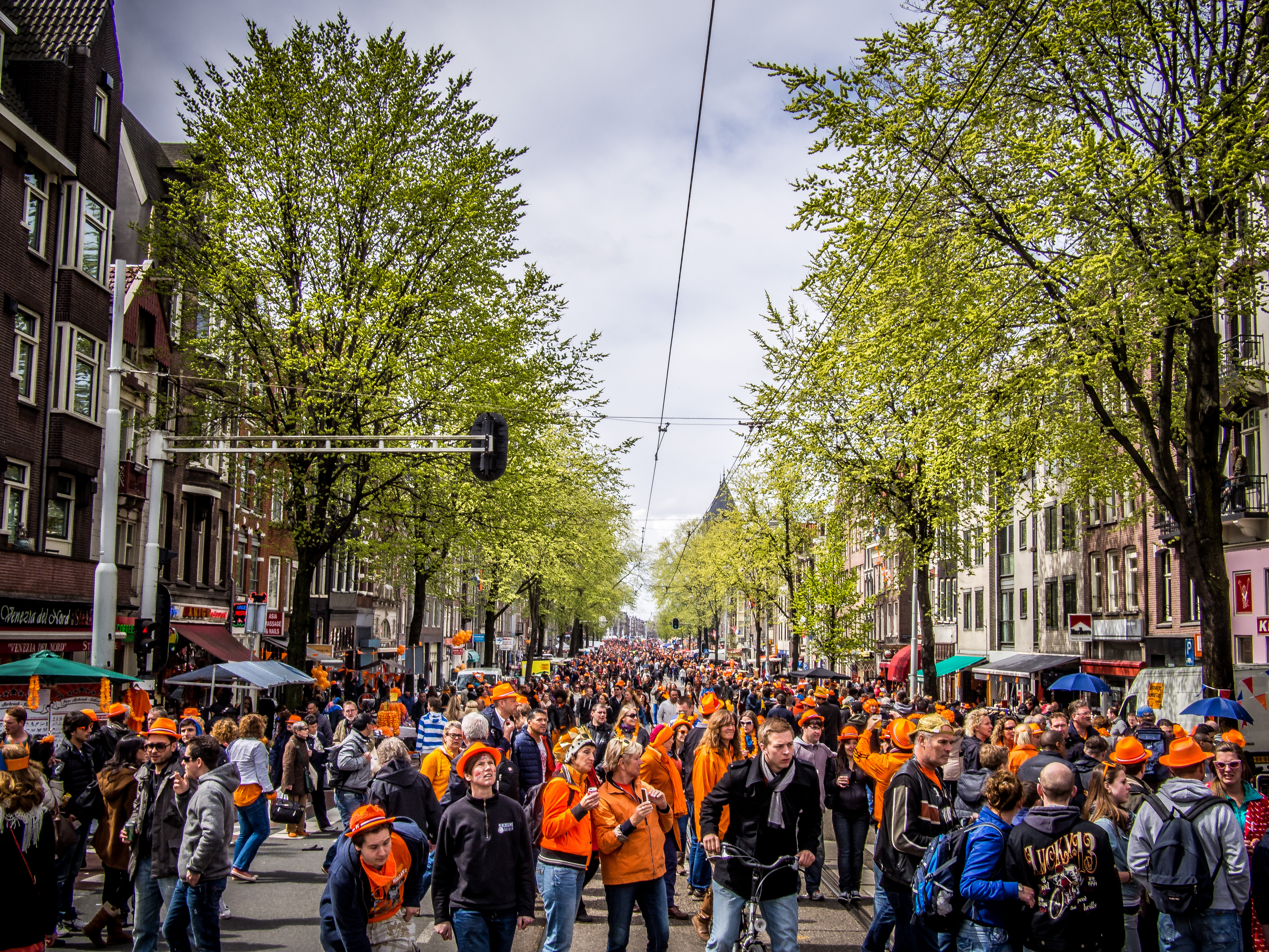 Queen's Day in Amsterdam 2013